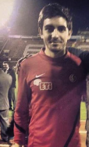 Onur Bayramoğlu